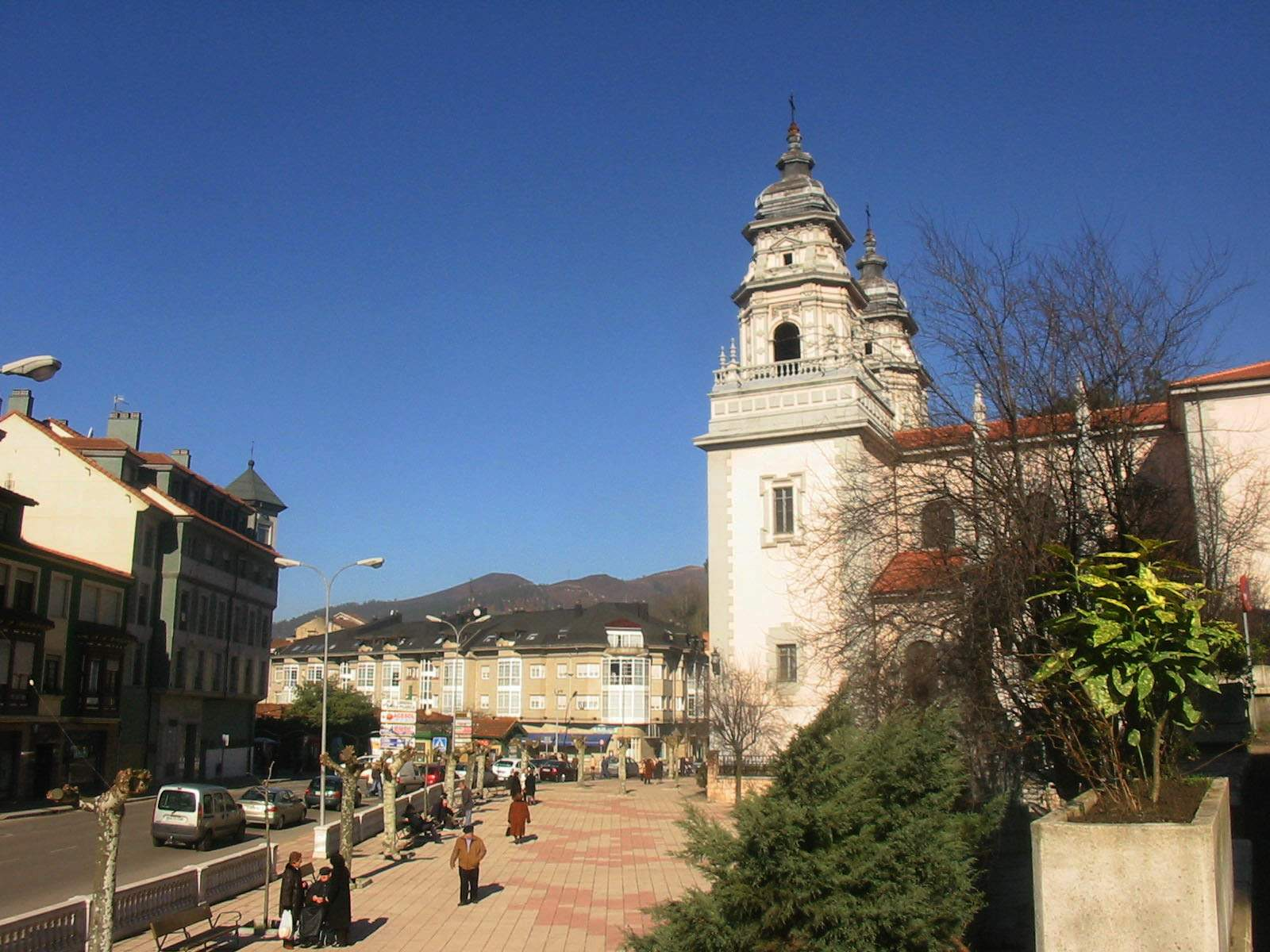 Mieres (Asturias)